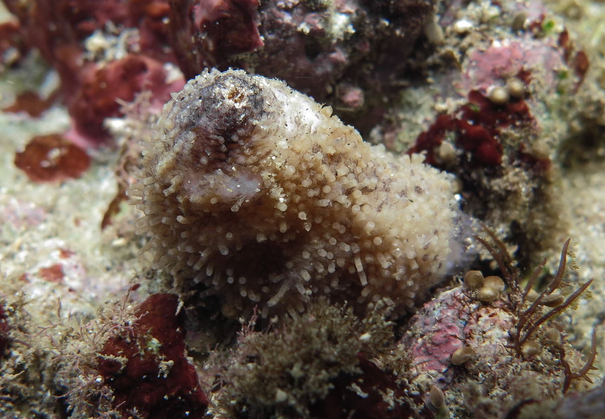 Une holothurie Phyrella ambigua à la Réunion.